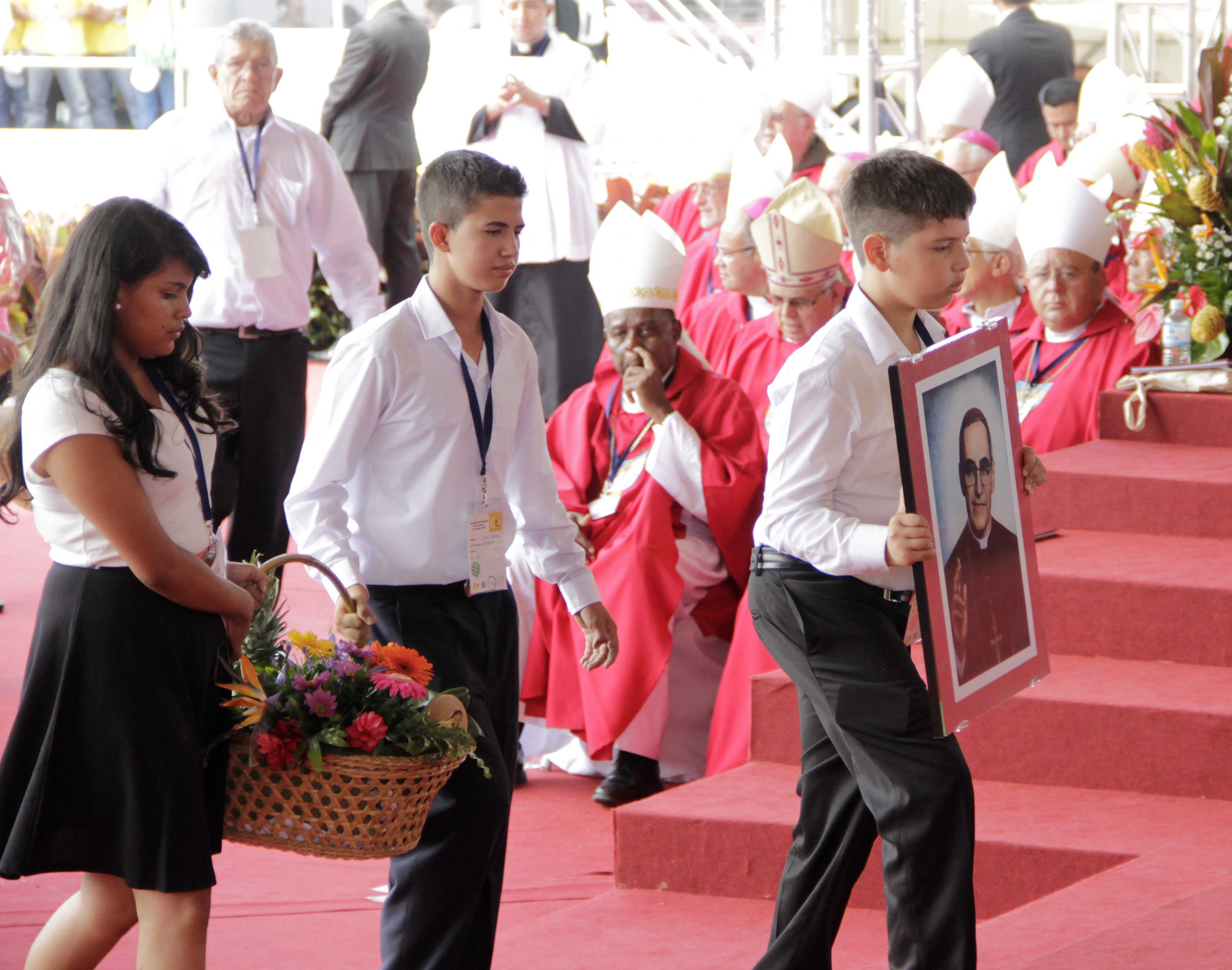 Vista General